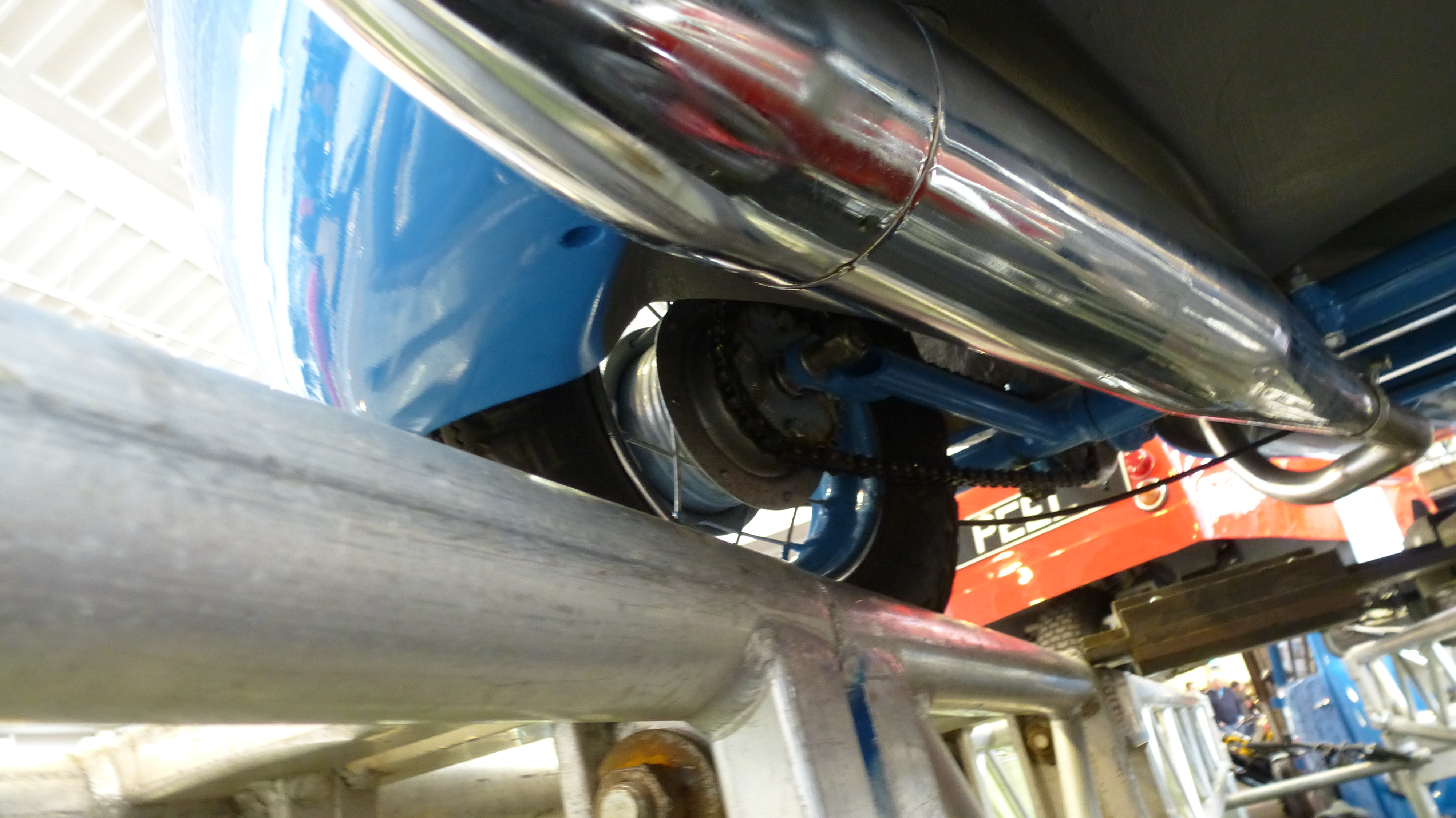 Mopetta GmbH Mopetta Nachbau von Andy Carter